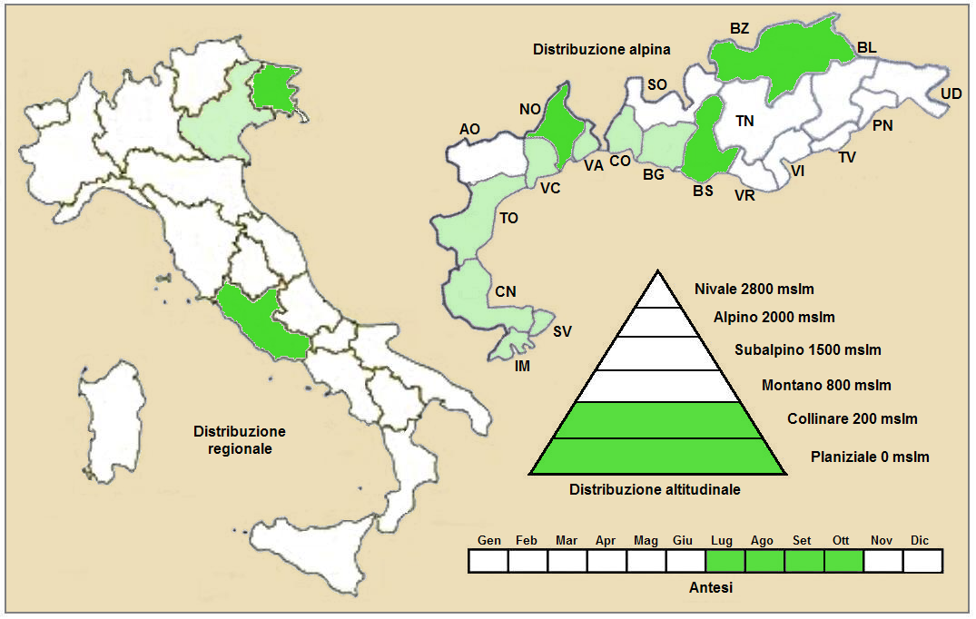 Astrantia major